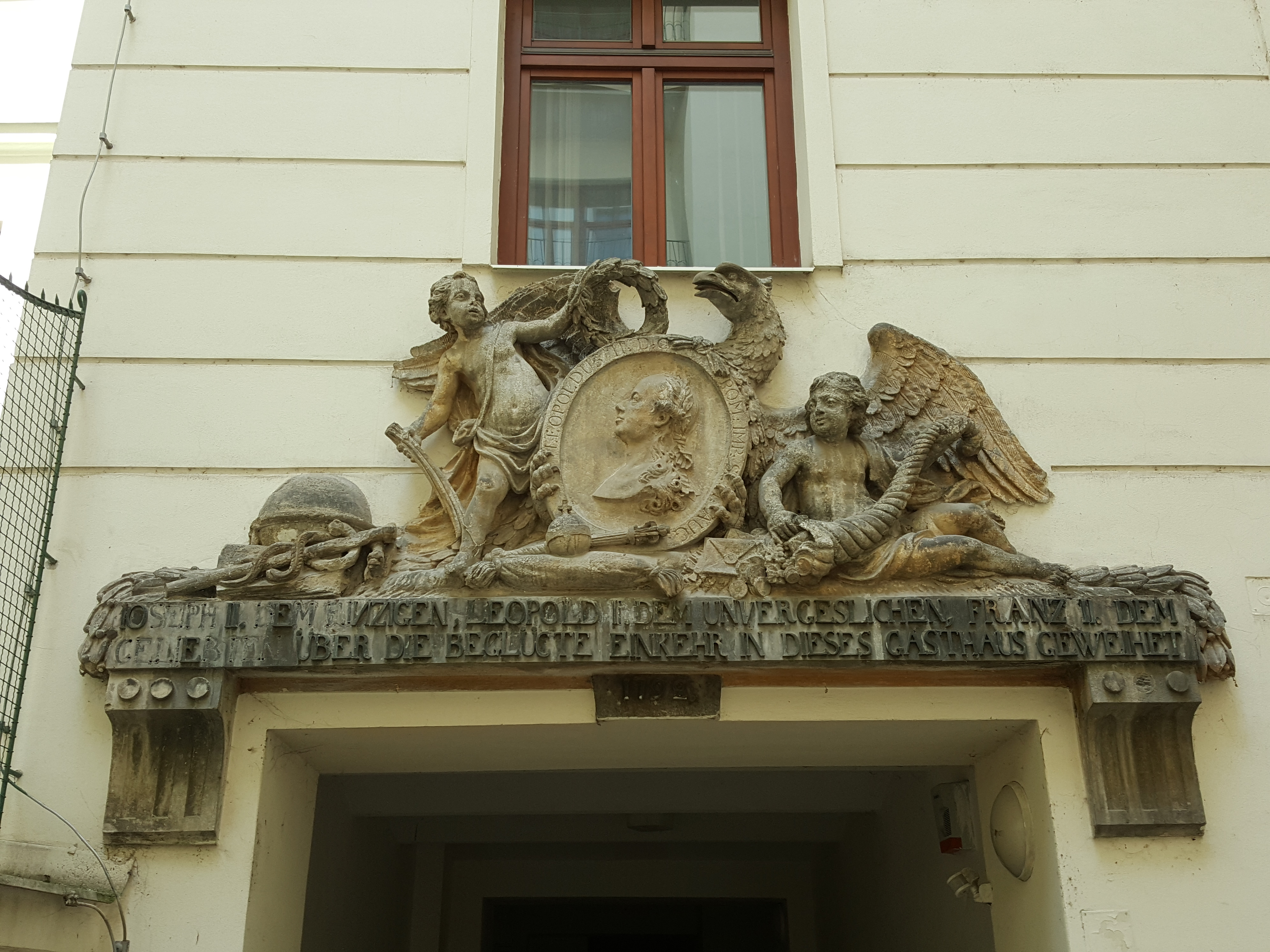 Supraporta z hostince U černého Orla, Brno (1792) - Ondřej Schweigl